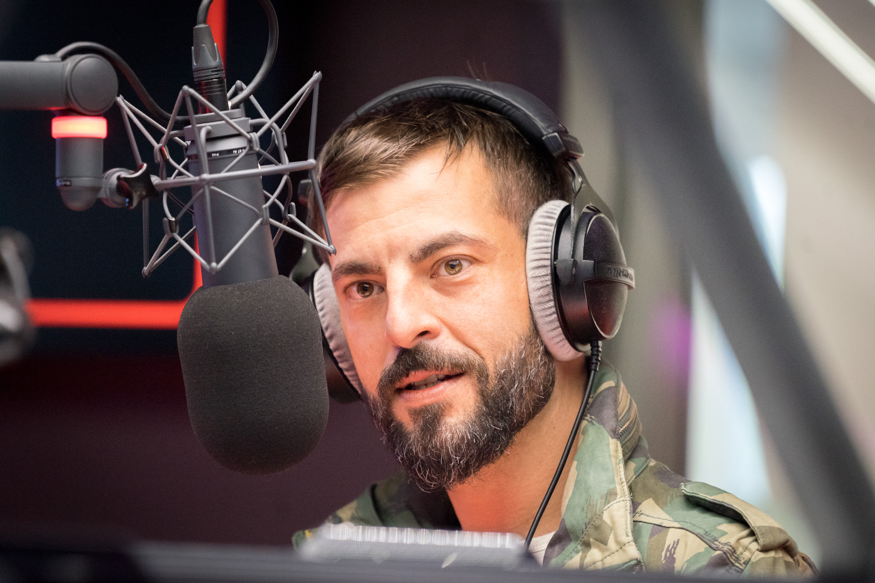 Musiker Bligg im Interview bei Radio Pilatus